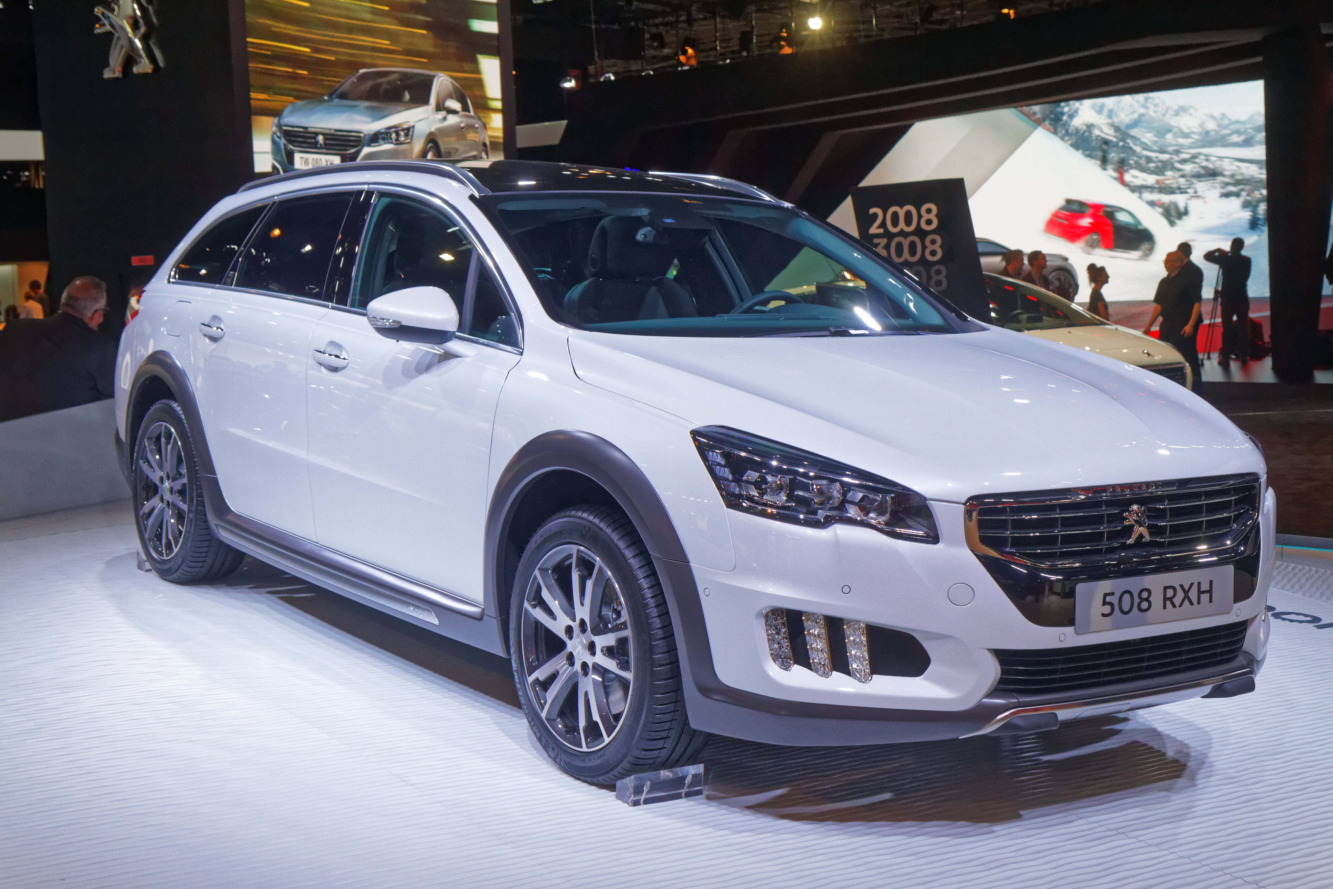 Une Peugeot 508 RXH présentée lors du mondial de l'automobile de Paris 2014.